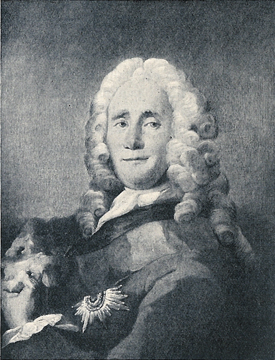 Greve og statsminister Johan Ludvig Holstein. 1694-1763.